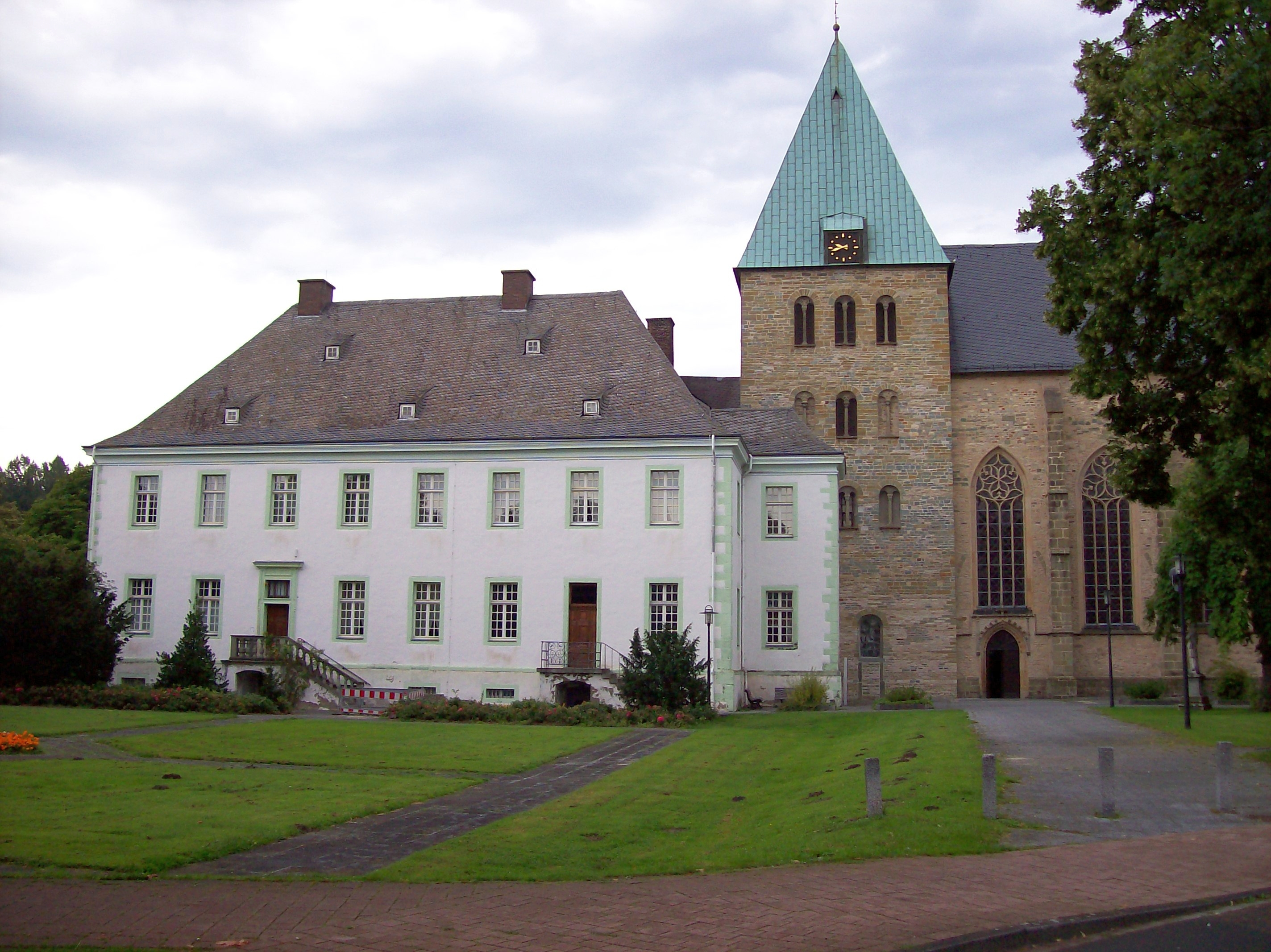 Abtei Liesborn, Seitenflügel mit Kirche (Germany)